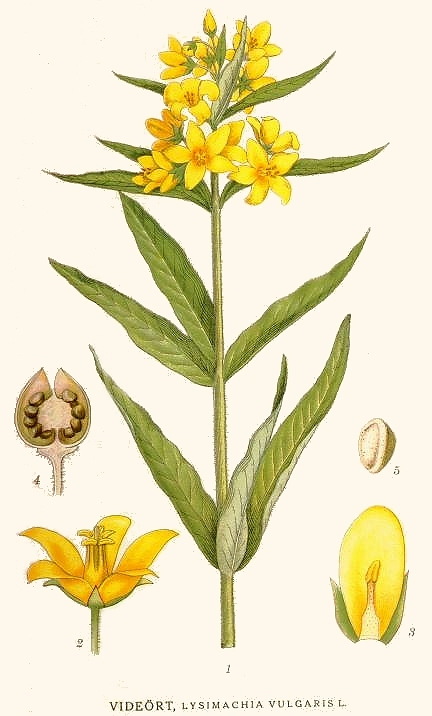 Original Description Videört, Lysimachia vulgaris L.